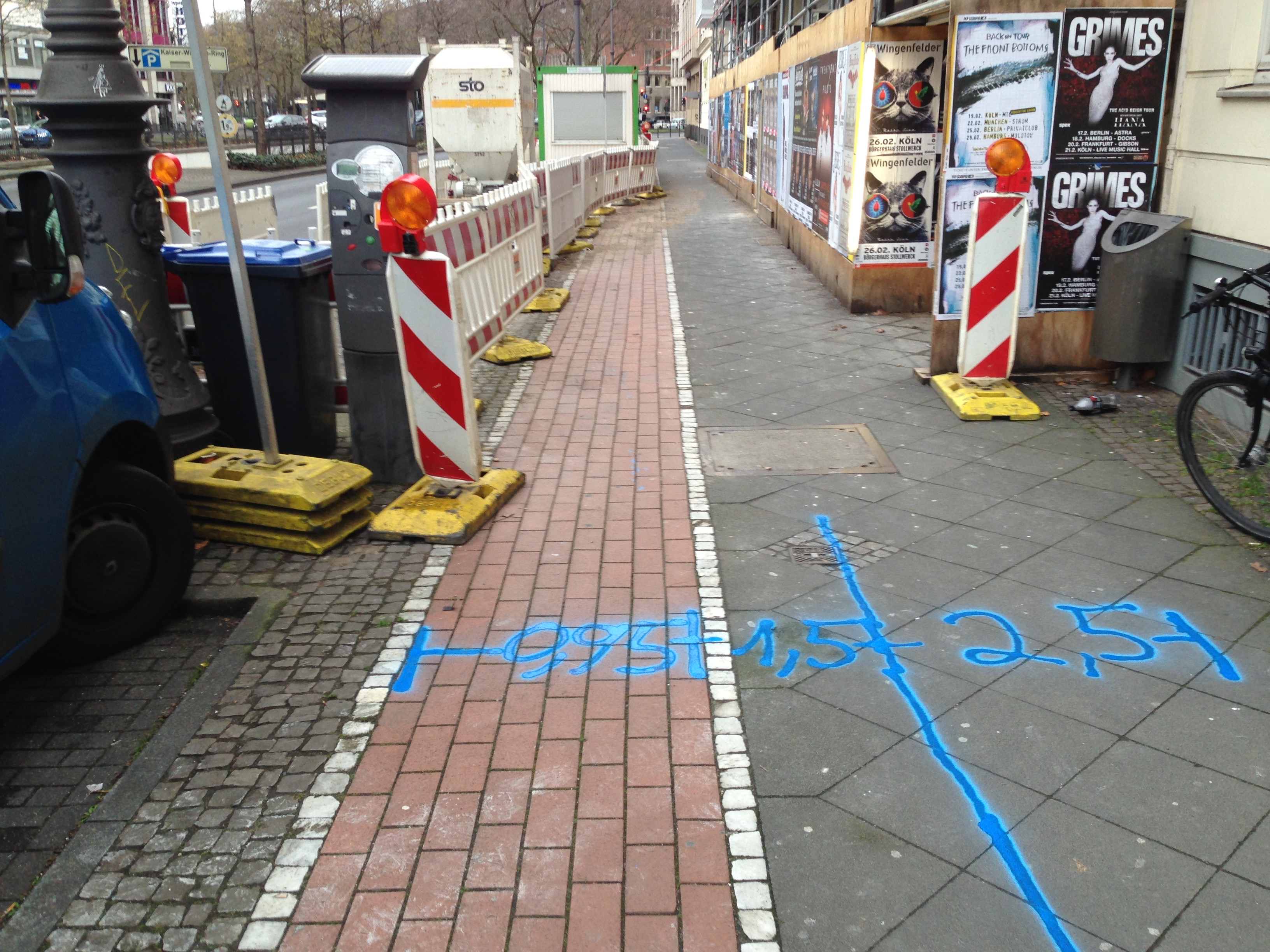 Der viel zu schmale bauliche Radweg auf dem Hansaring mit blau aufgesprühten Mindest- und Sollbreiten, die sich aus der Empfehlungen für Radanlagen (ERA 2010) ergeben.